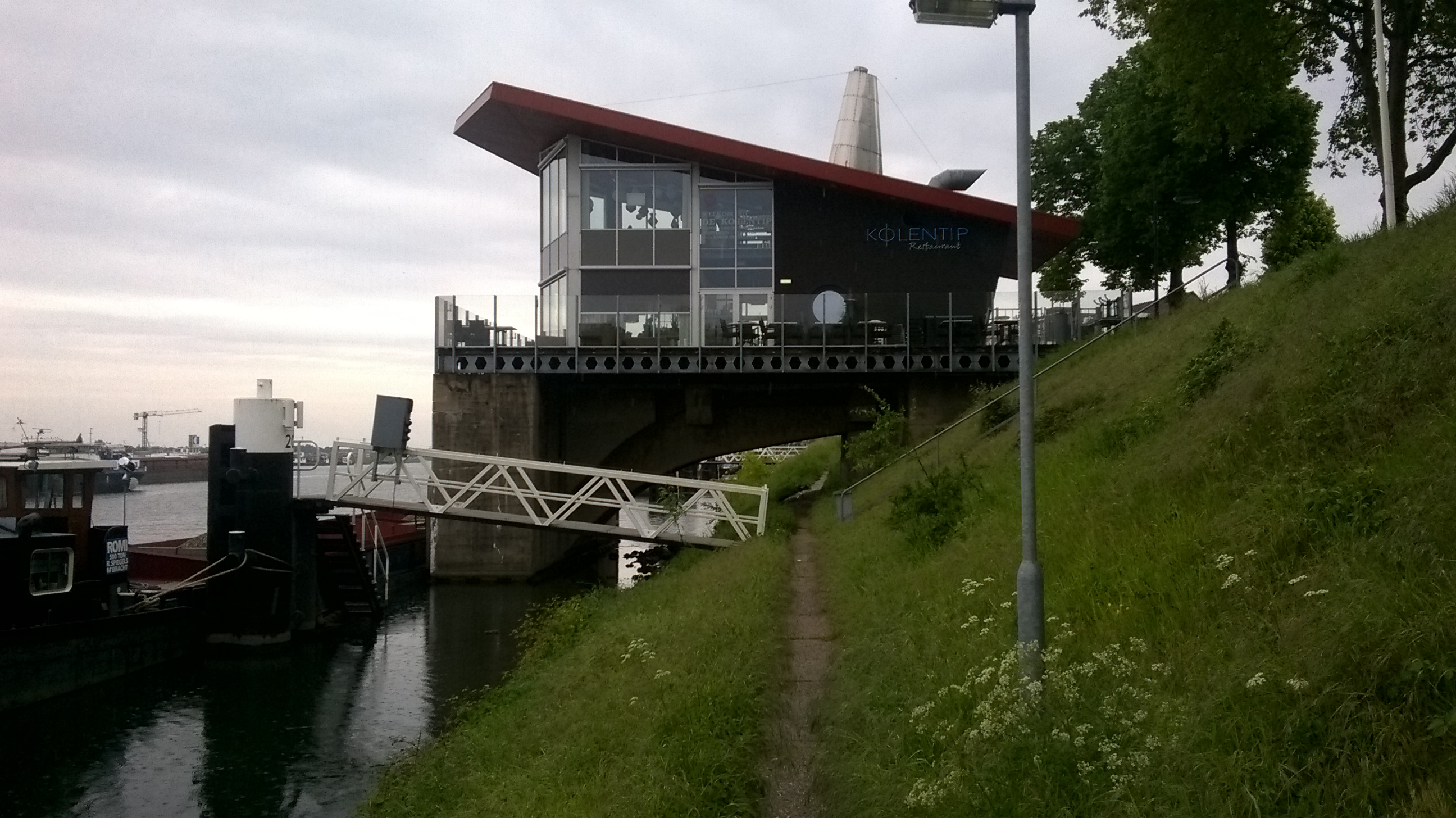 Restaurant de Kolentip in Maasbracht gezien vanuit het zuiden. Het betonnen onderstel is van de kolentip. Deze deed in de 20e eeuw dienst.